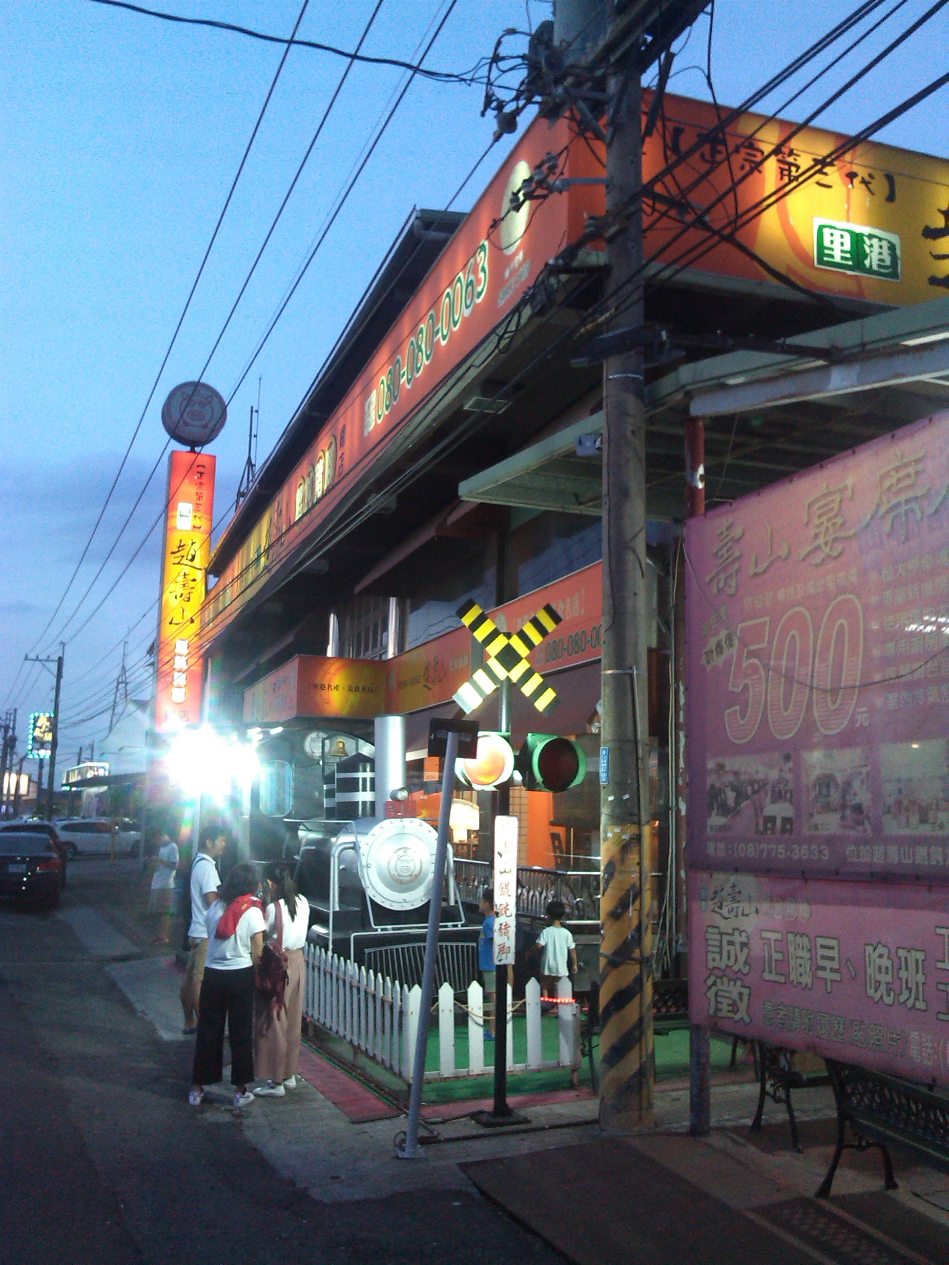 位於台3線(九如路三段)上 近九如交流道及里港市區